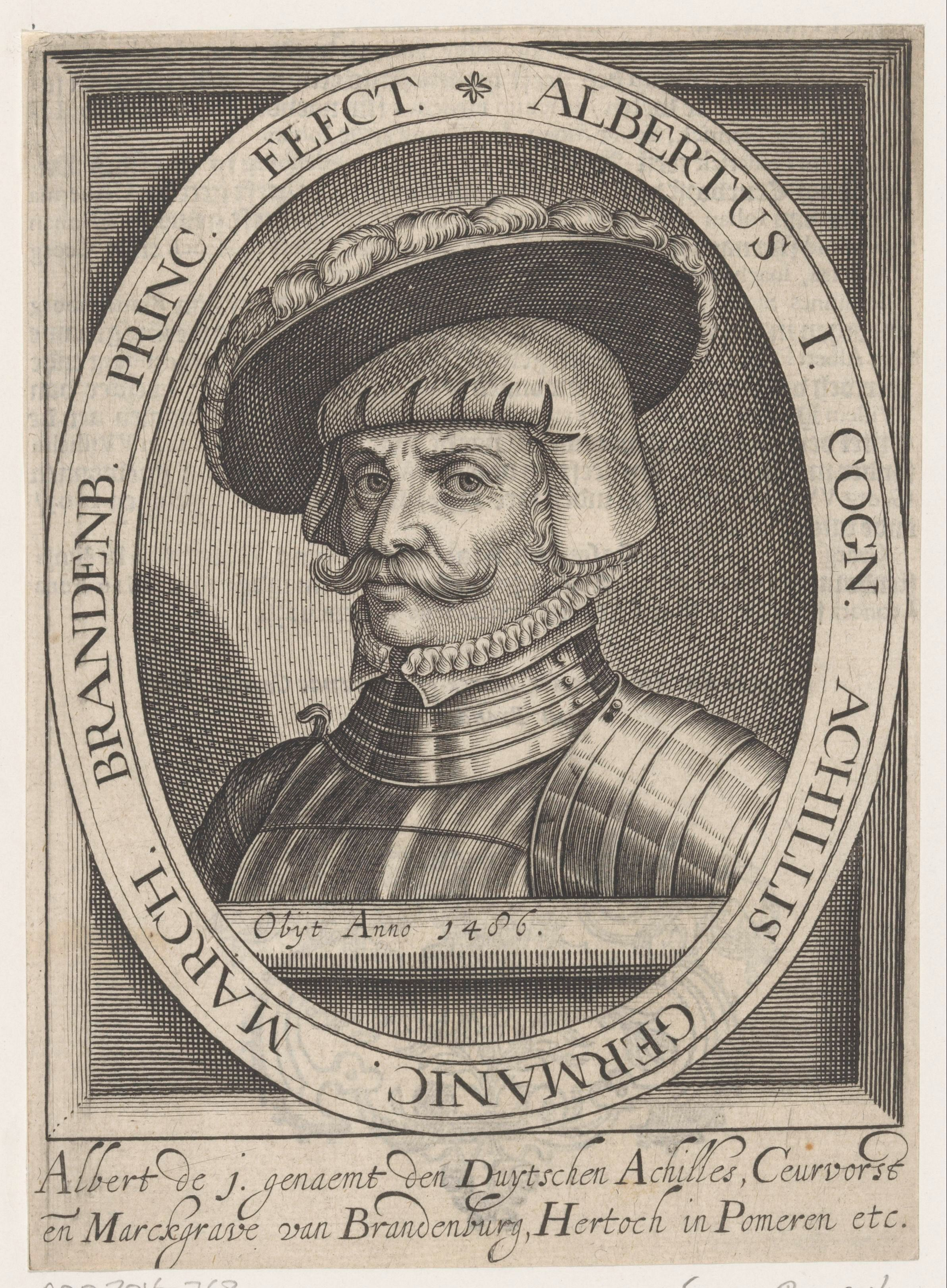 IdentificatieTitel(s): Portret van Albrecht III Achilles, keurvorst van BrandenburgObjecttype: prent boekillustratie Objectnummer: RP-P-2016-768VervaardigingVervaardiger: prentmaker: anoniemuitgever: Nicolaes de ClerckPlaats vervaardiging: DelftDatering: 1617Fysieke kenmerken: gravure en tekst in boekdruk op het versoMateriaal: papier Techniek: graveren (drukprocedé) / boekdrukAfmetingen: blad: h 175 mm (binnen plaatrand afgesneden) × b 127 mm (binnen plaatrand afgesneden)ToelichtingPrent uit: Clerck, Nicolaes de. Tooneel der beroemder hertogen princen graven ende krygs-helden van christenrijck. Delft: Nicolaes de Clerck, 1617. Dit is Waar: schijnlijk een portret van Albrecht III Achilles, keurvorst van Brandenburg, en niet van Albrecht I.OnderwerpWie: Albrecht III Achilles keurvorst van BrandenburgVerwerving en rechtenVerwerving: onbekend 2016Copyright: Publiek domein